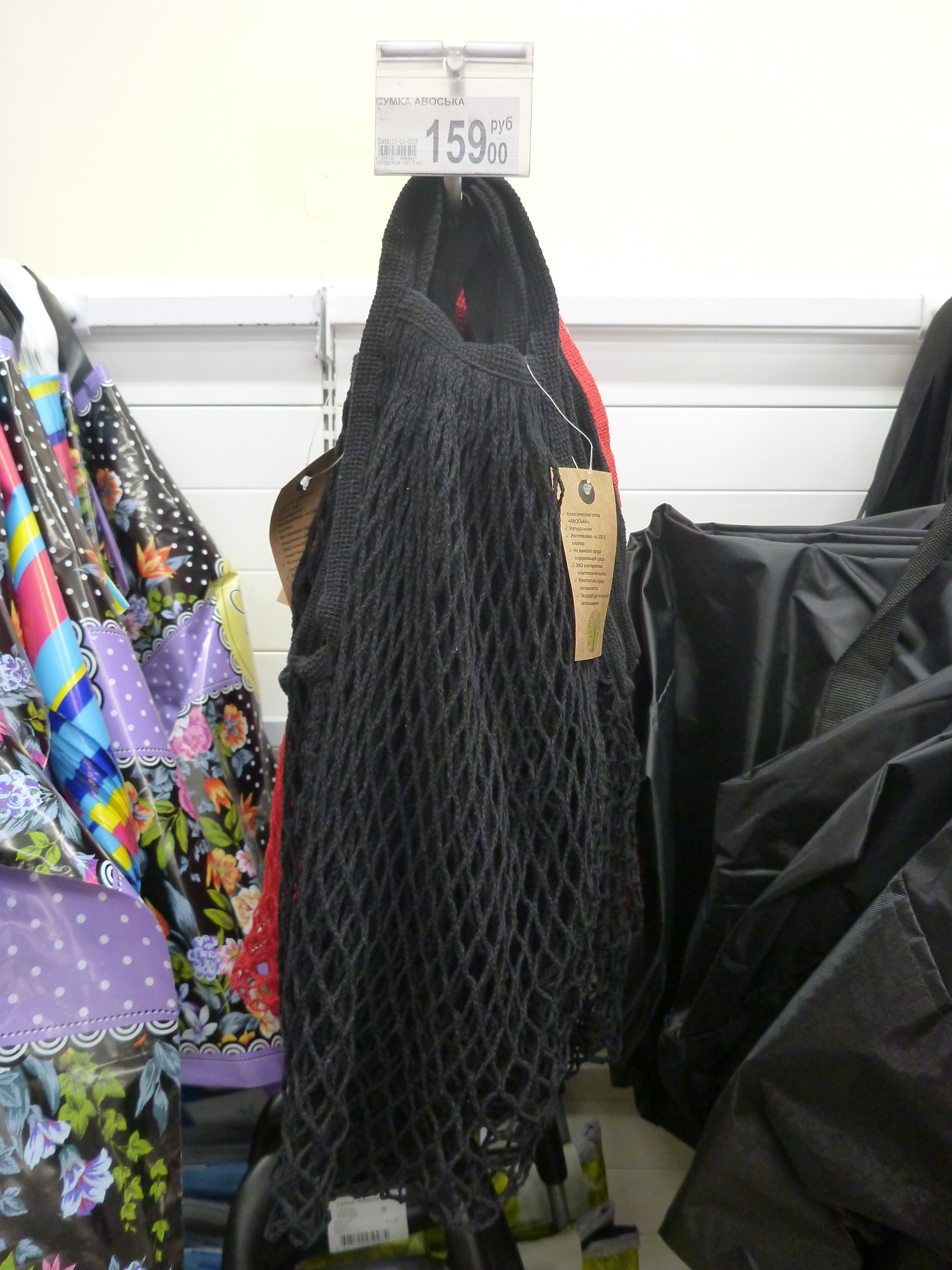 Авоська в Ашане Екатеринбурга 2019 год